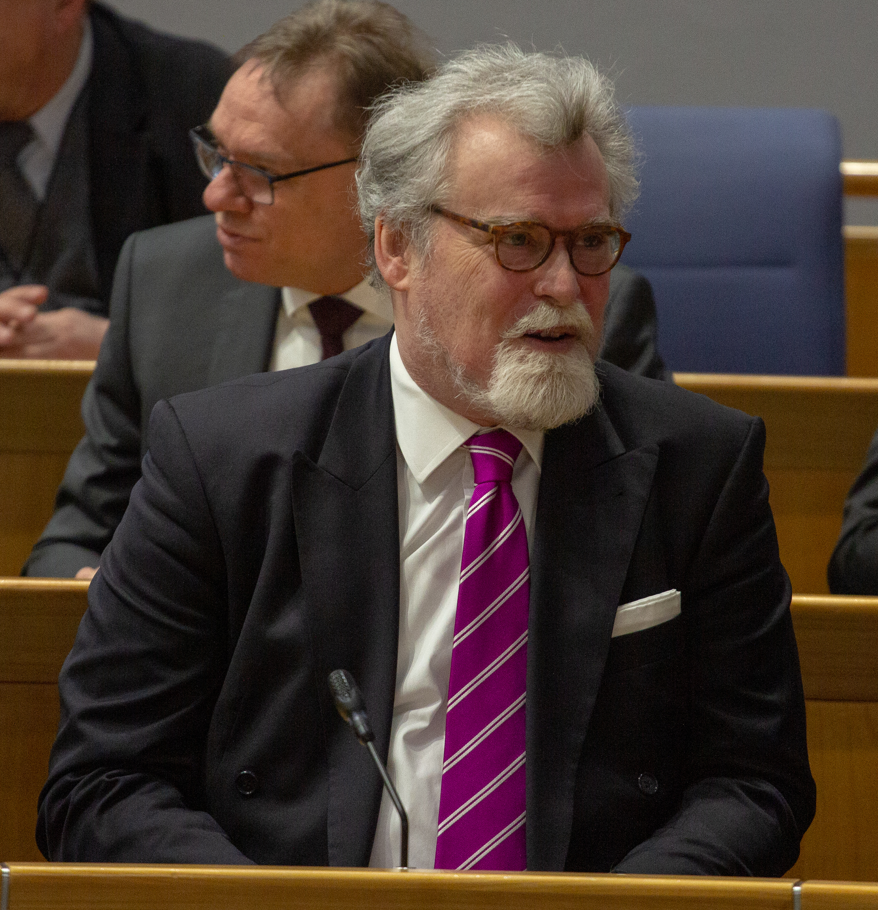 Tag des Gedenkens an die Opfer des Nationalsozialismus im Landtag Rheinland-Pfalz am 27. Januar 2019.